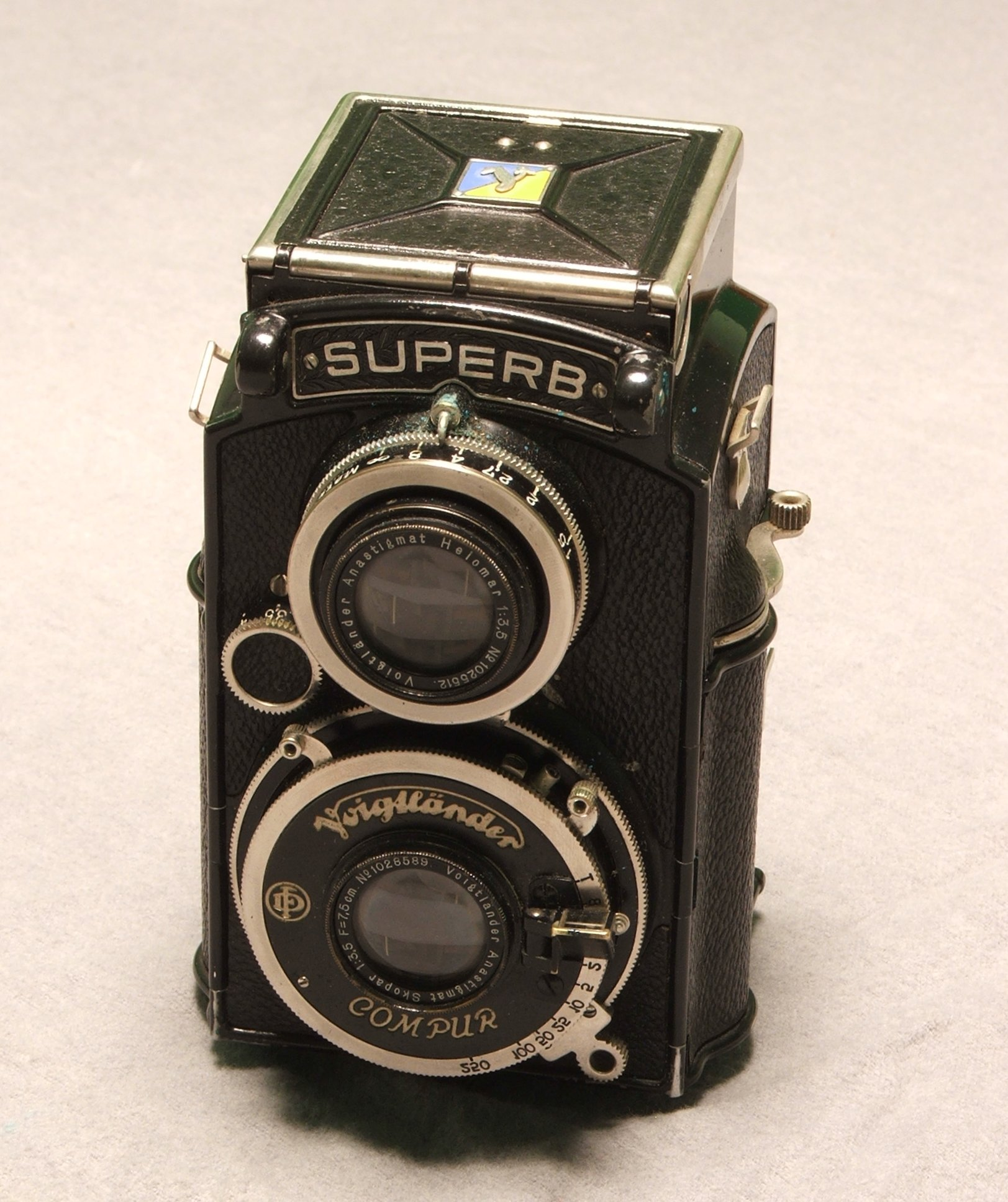 A "Voigtländer Superb" from 1935